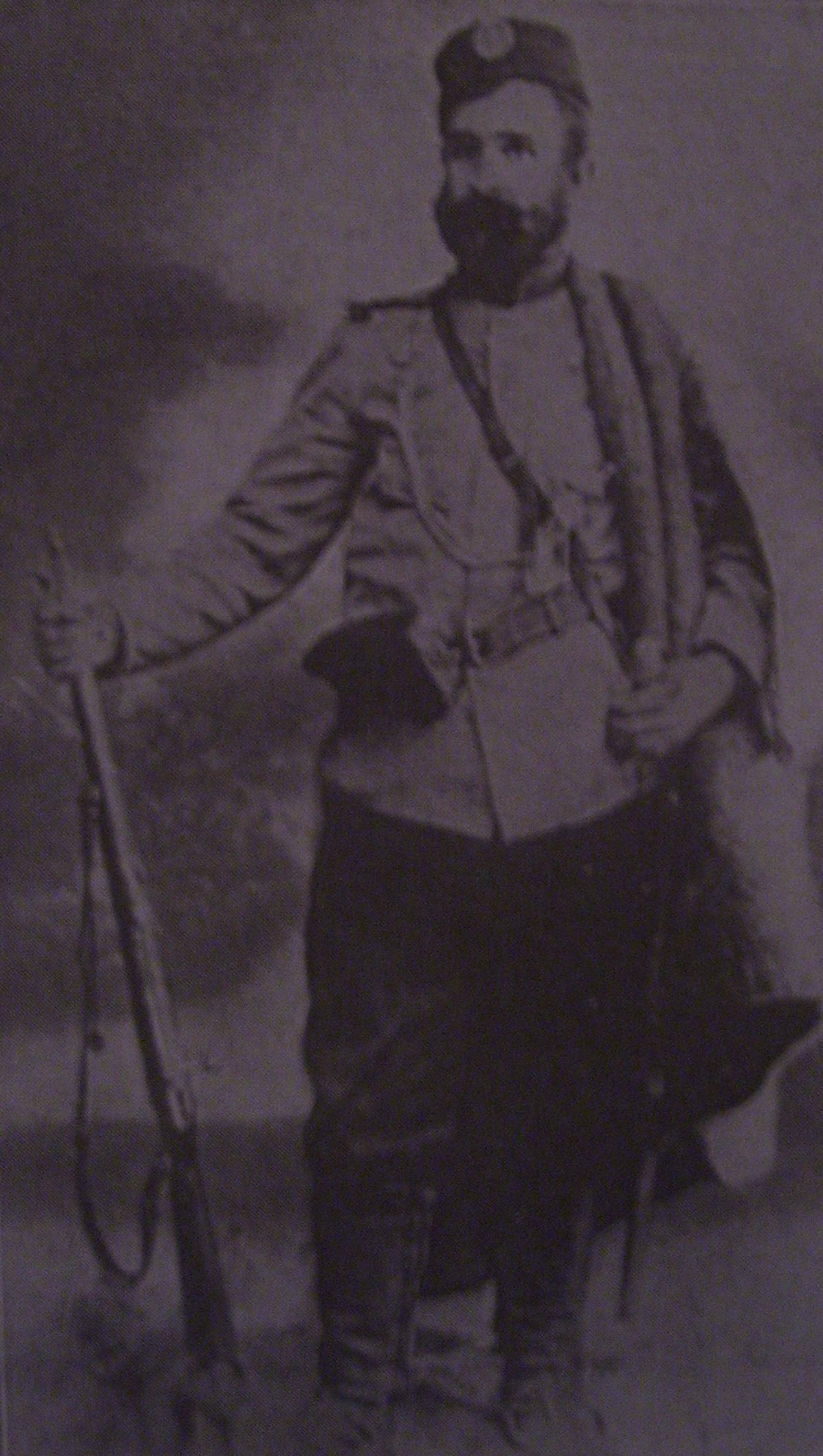 Васил Календжиев.